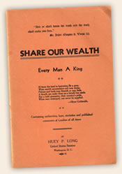 Лонг - Разделим наше богатство (обложка, 1935)